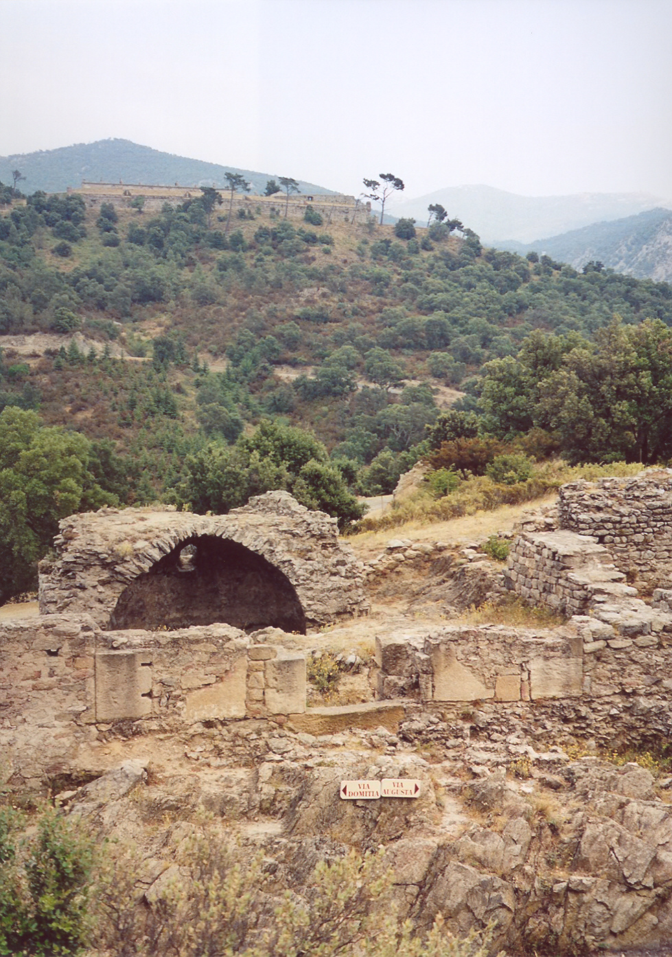 El coll de Panissars, entre les restes del priorat de Santa Maria de Panissars, lloc on es trobaven a l'Antiguitat la Via Domícia i la Via Augusta (en primer terme), i la fortalesa de la Bellaguarda (al fons).